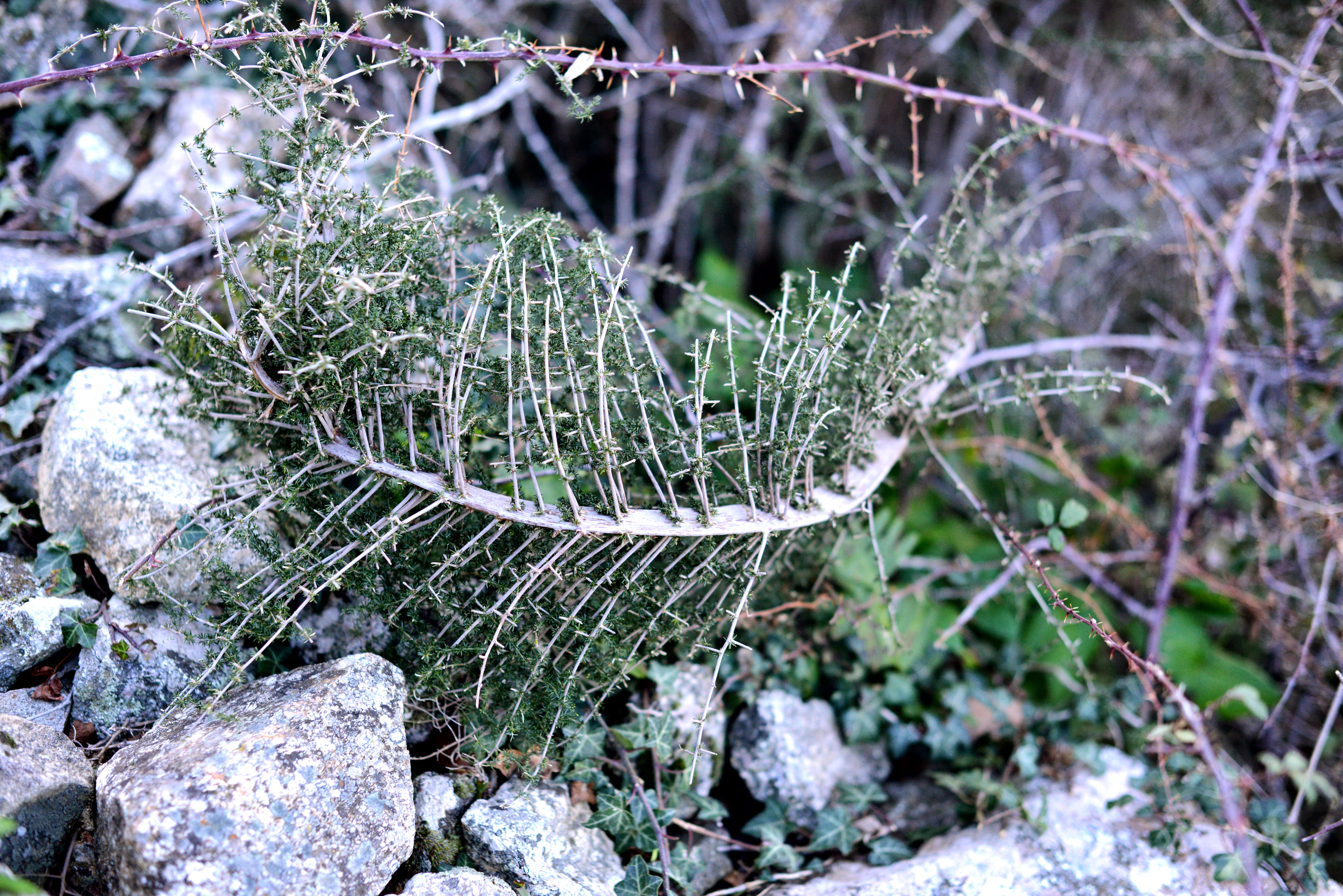 Lumio, Balagne (Corse) - Spécimen d'asperge sauvage à tige plate qui se présente généralement en une longue tige ronde, remarqué proche du village abandonné d'Occi